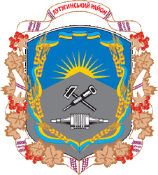 Герб Лутугинського району